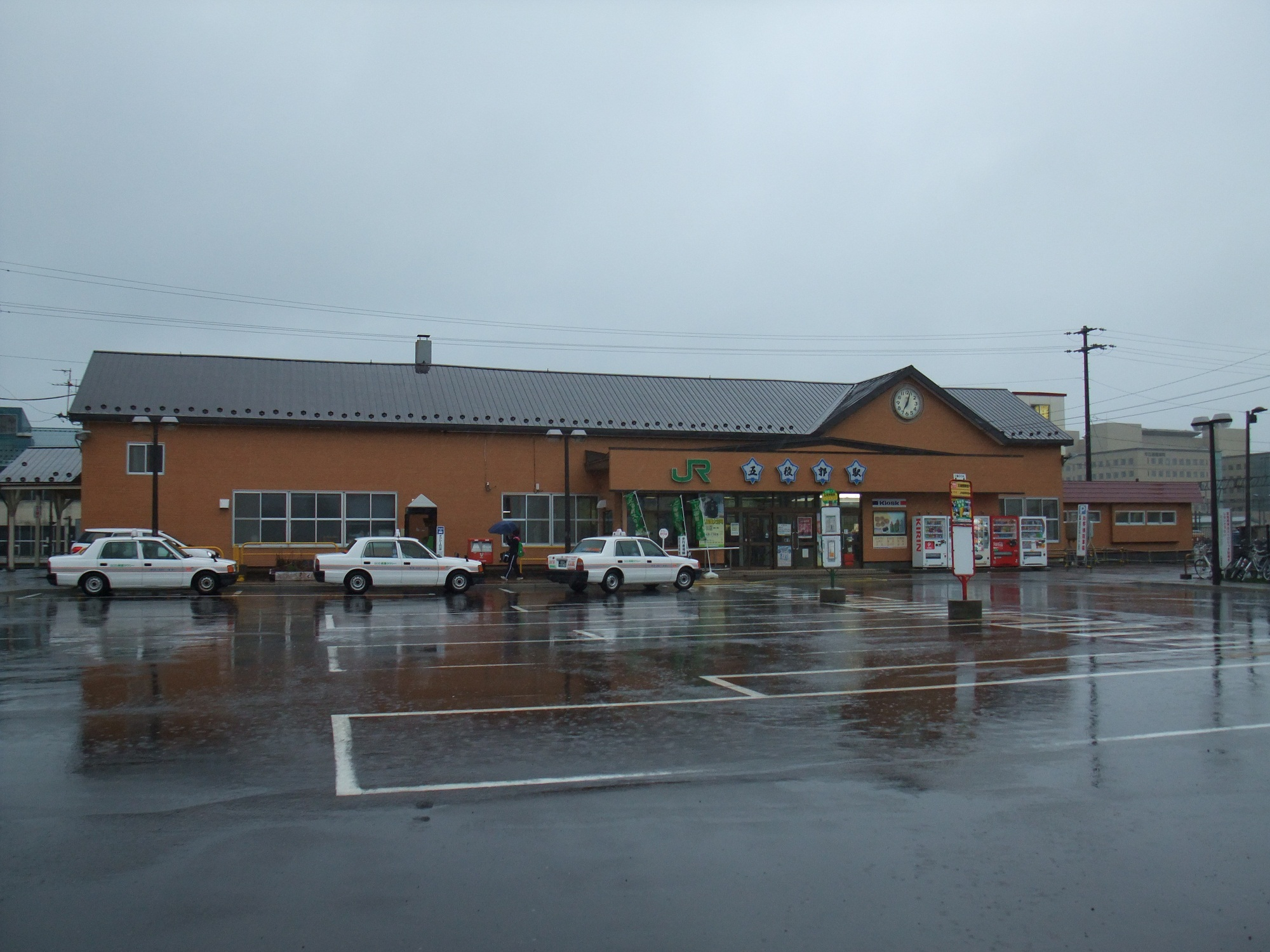 五稜郭駅(リニューアル後)